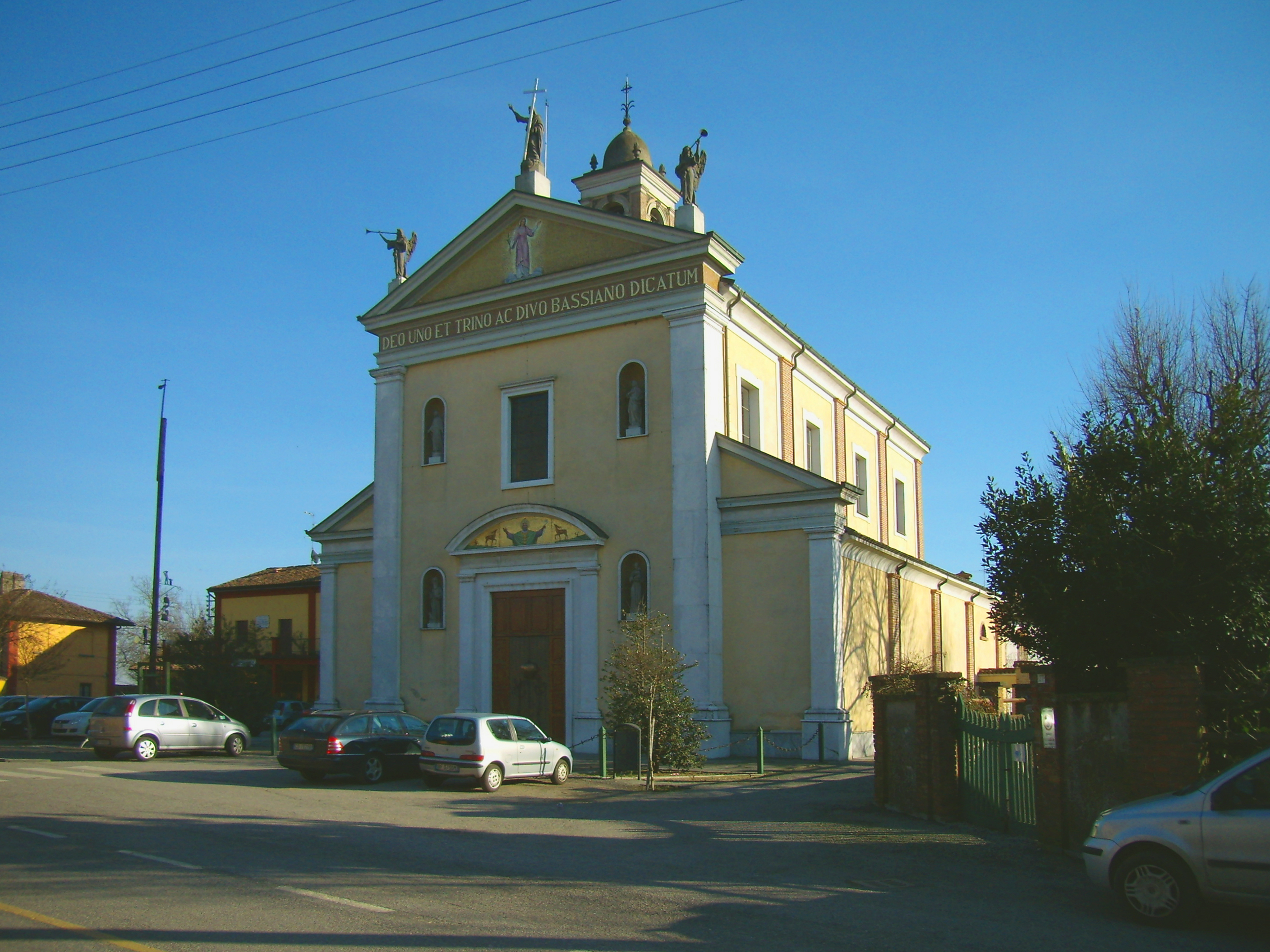 Facciata della chiesa parrocchiale della Santissima Trinità e San Bassiano a Gradella, fraz. di Pandino (CR)